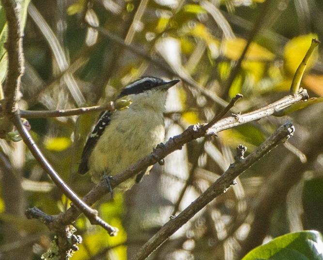 Serra Antwren - Sumidoro - Brazil_S4E1134